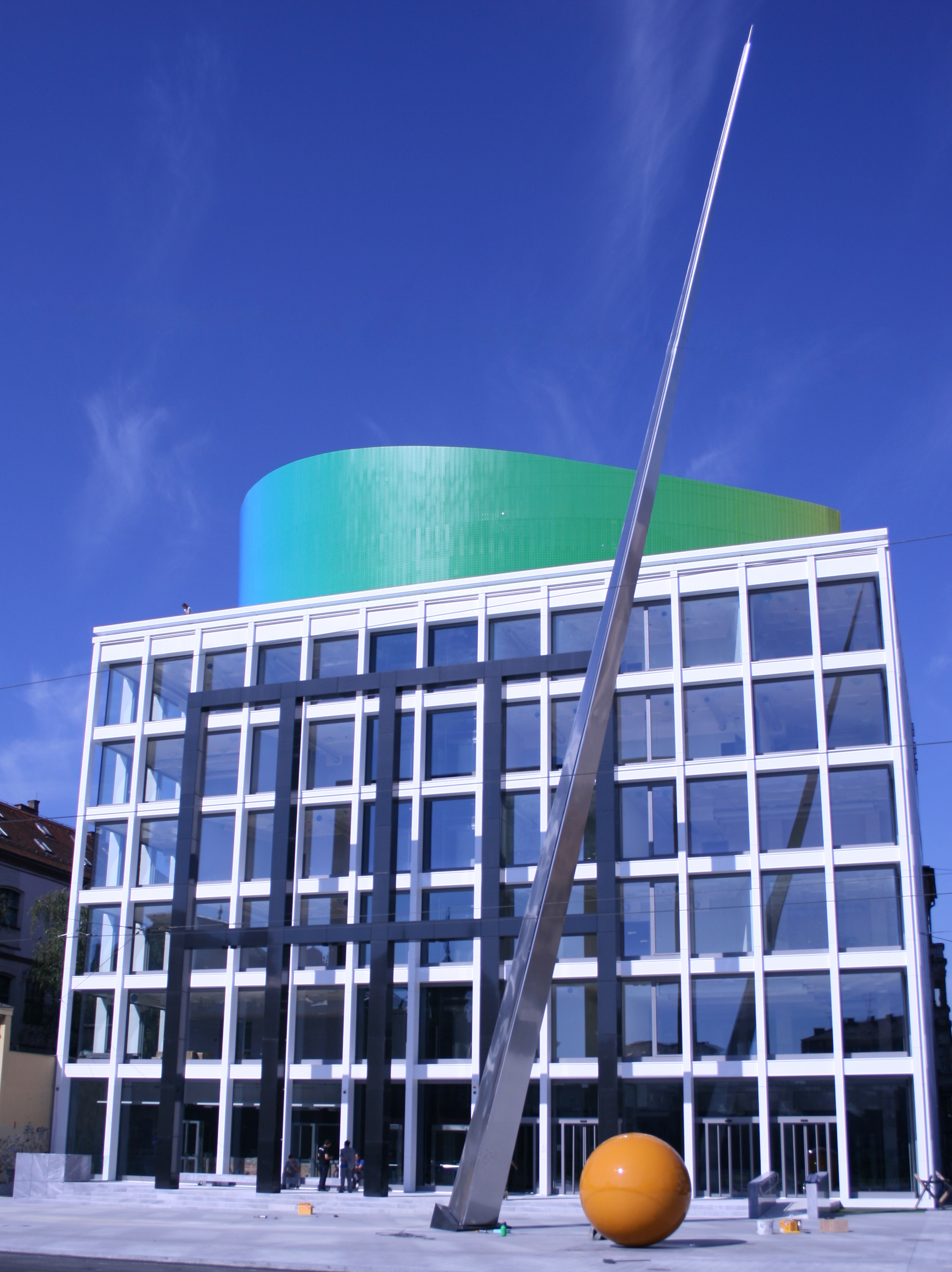 Nova zgrada Muzičke akademije u Zagrebu